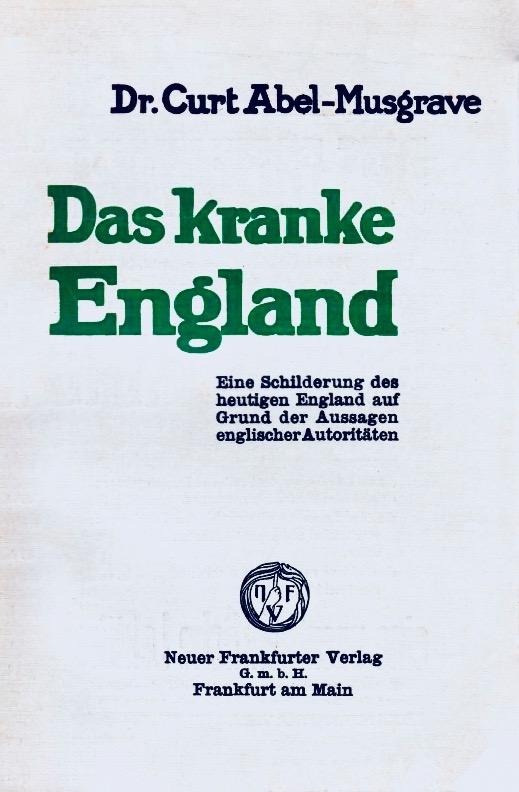 The sick England - Een beschrijving van het Engeland van vandaag op basis van de verklaringen van de Engelse autoriteiten. Neuer Frankfurter Verlag, Frankfurt aan de Main 1909.